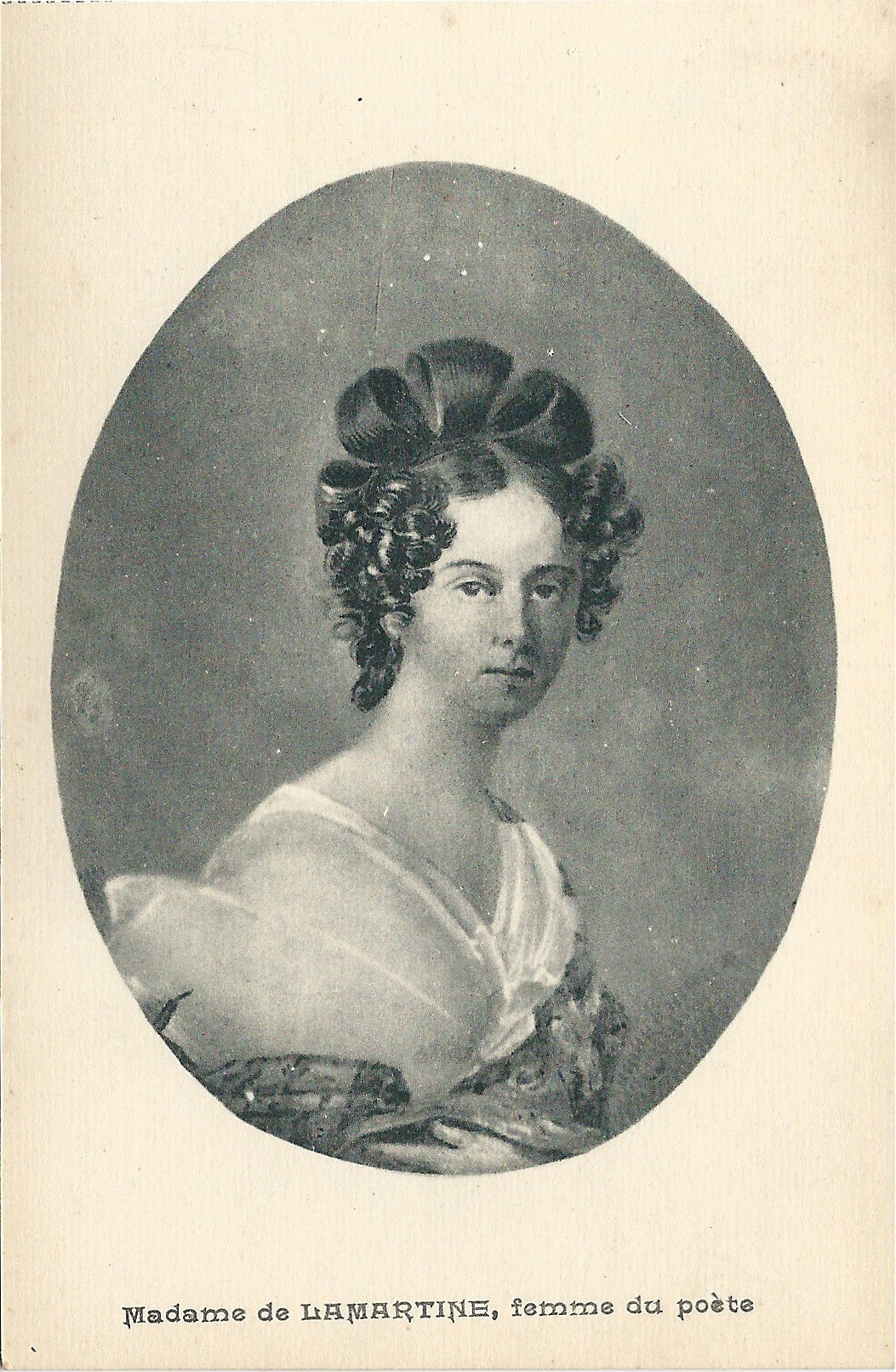 Souvenirs autour du poète Alphonse de Lamartine